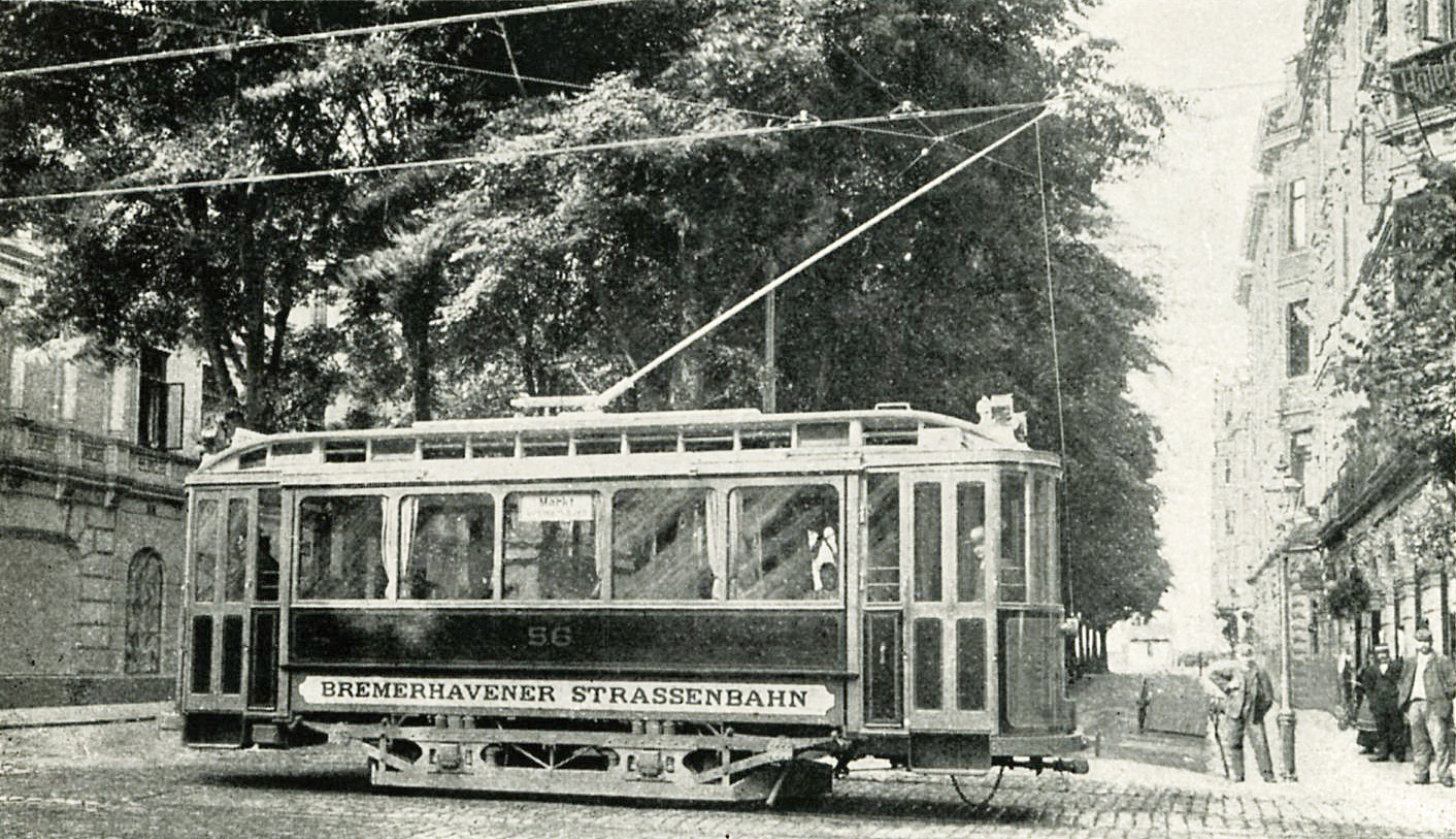 Elektrischer Triebwagen 56 der Bremerhavener Straßenbahn.